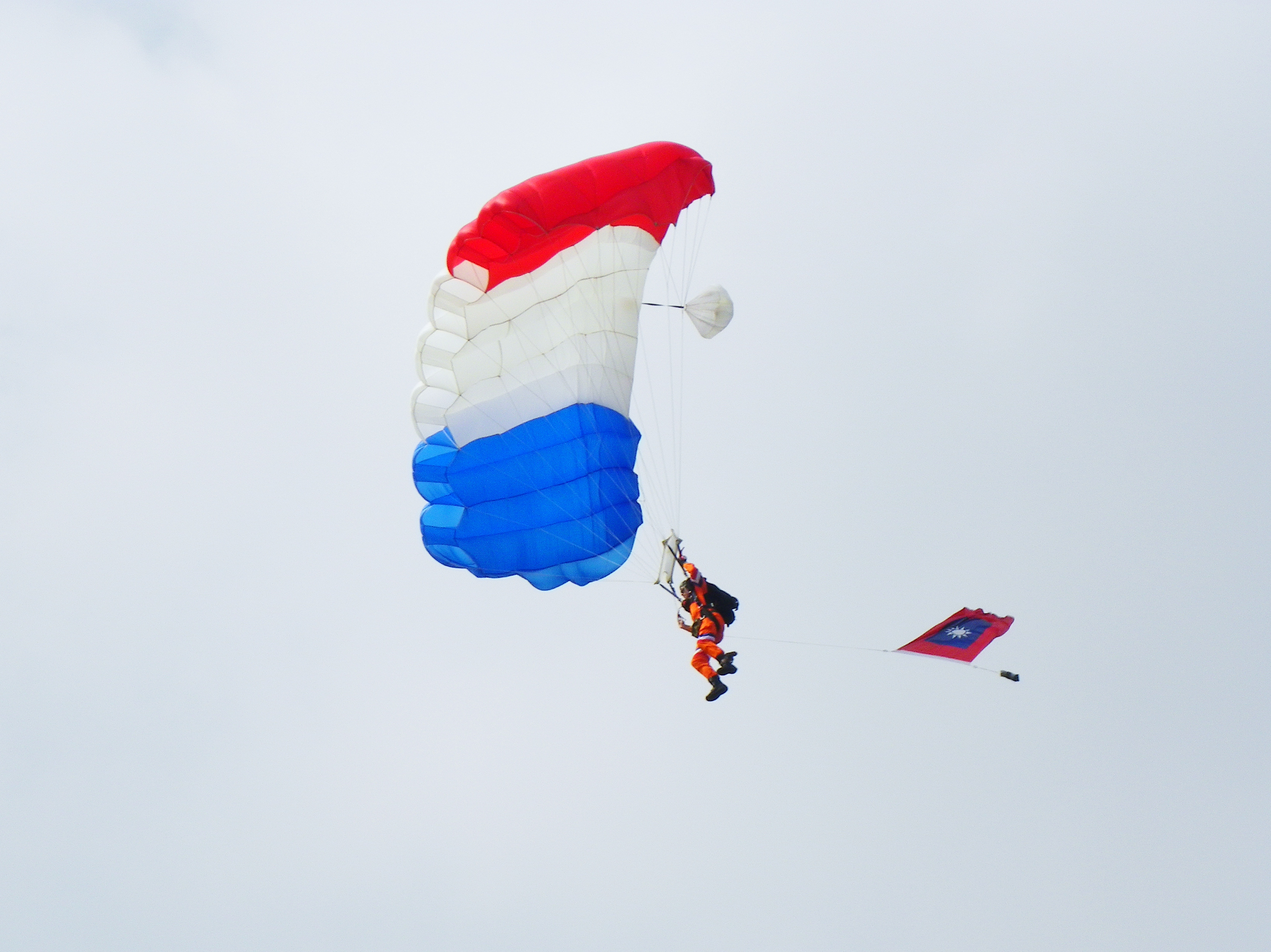 2011年陸軍湖口營區開放跳傘表演，攜帶中華民國陸軍軍旗降落中的神龍小組隊員。